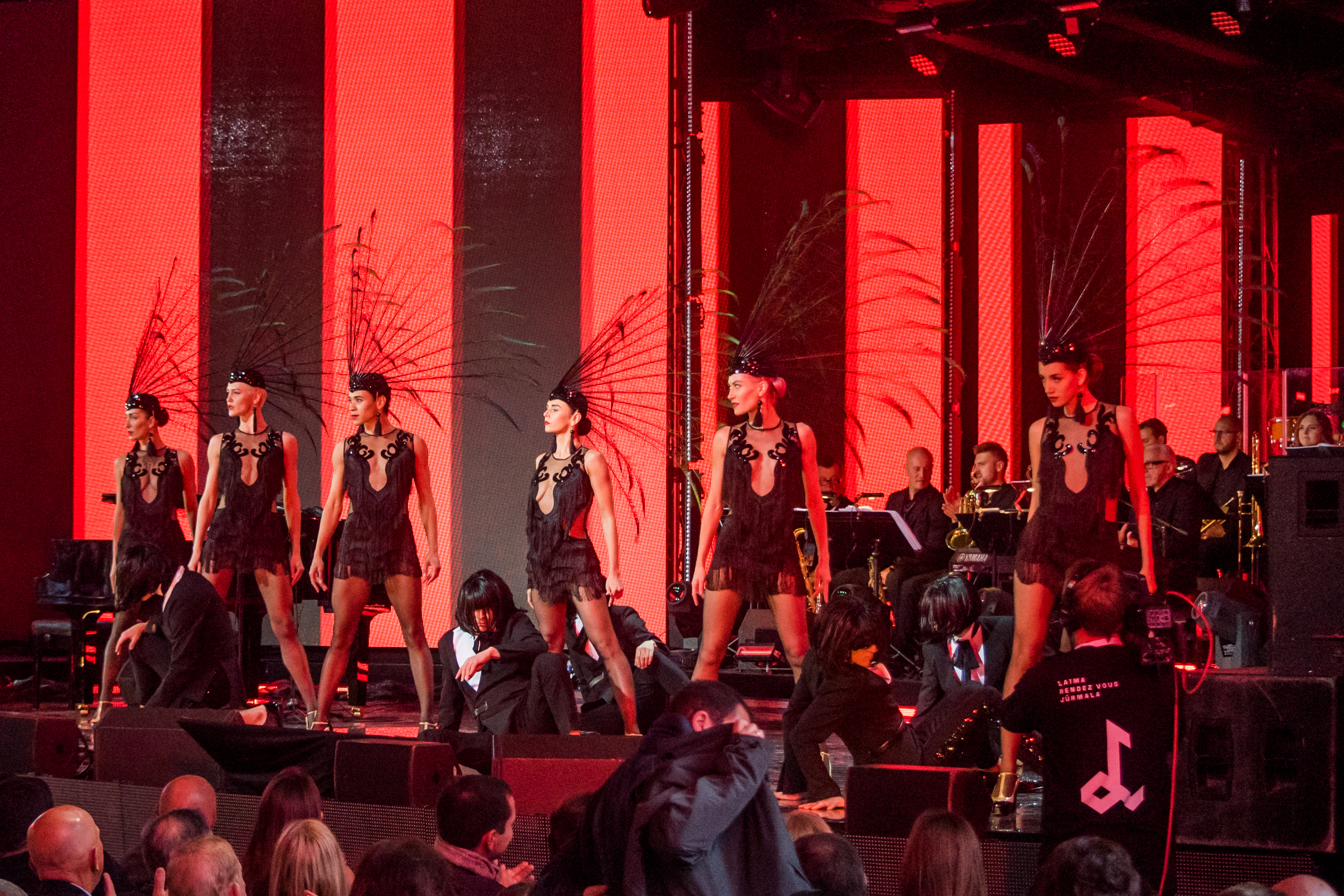 Freedom Ballet на фестивале «Лайма. Рандеву. Юрмала 2017»